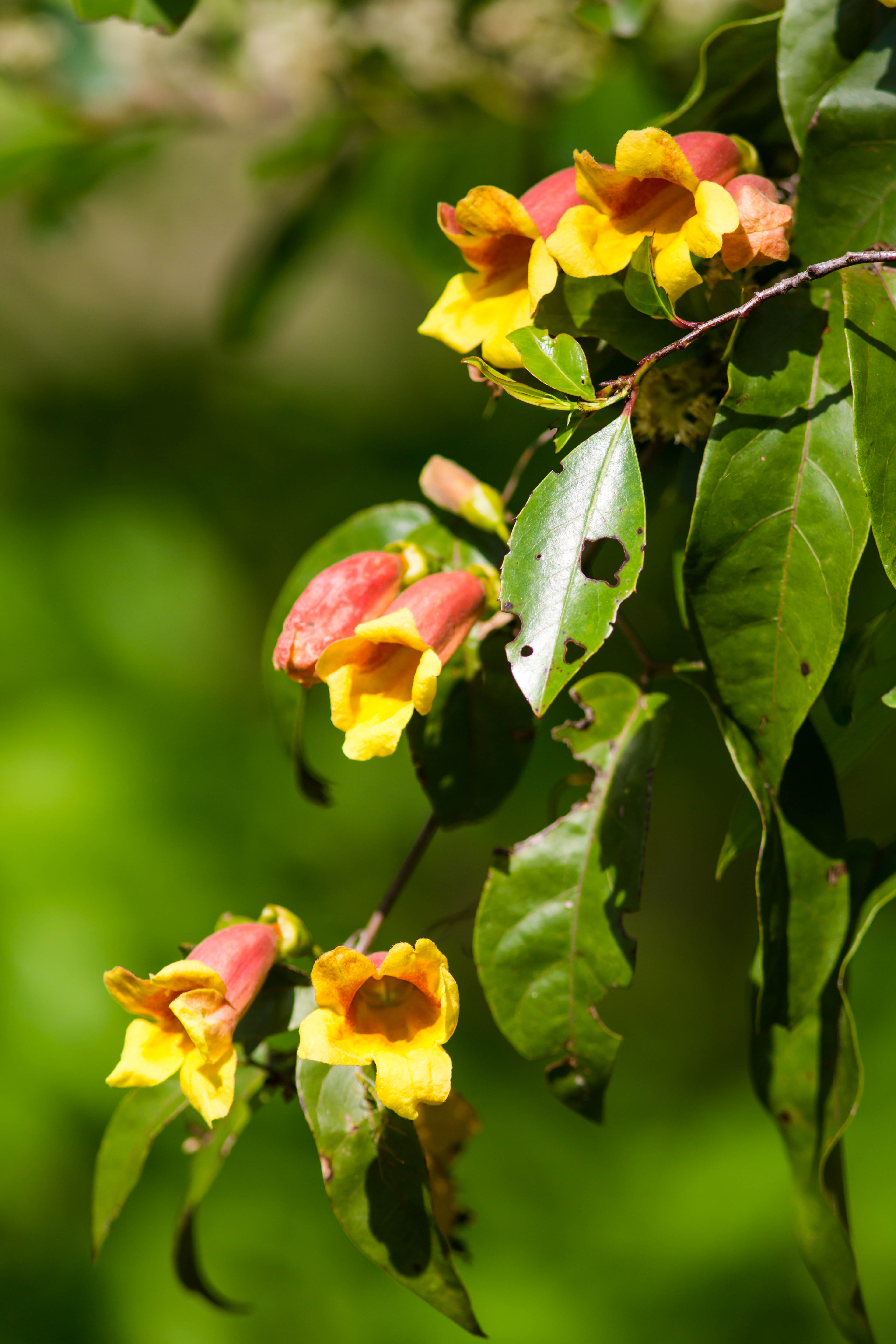 Crossvine